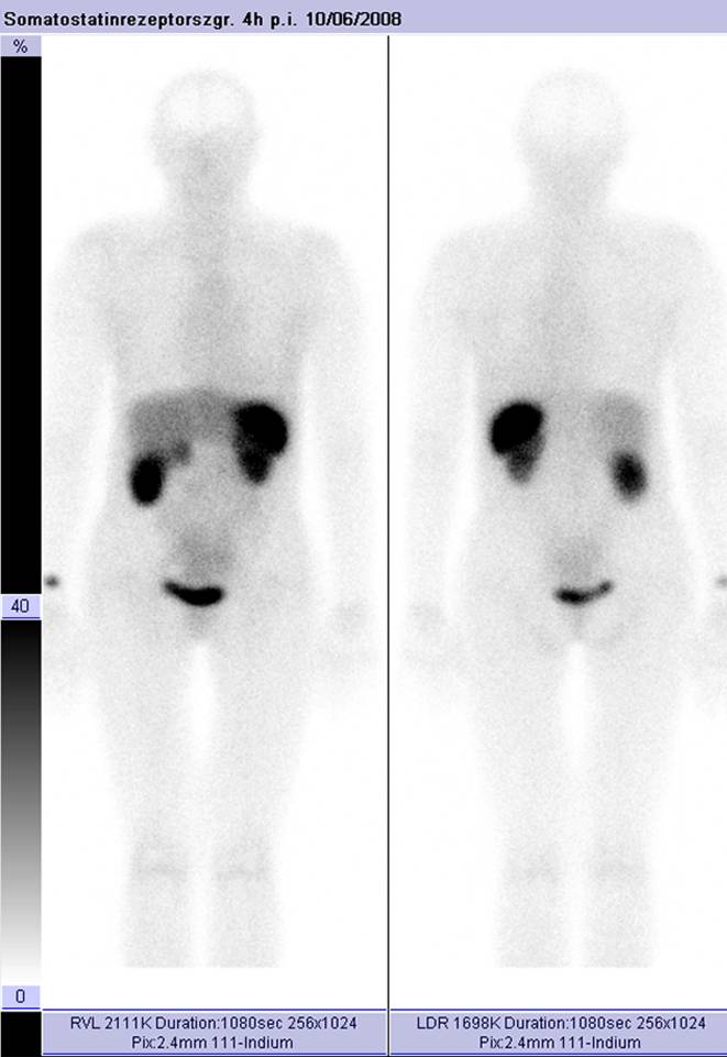 Somatostatin-Rezeptor-Szintigrafie mit 111Indium-Octreoscan®